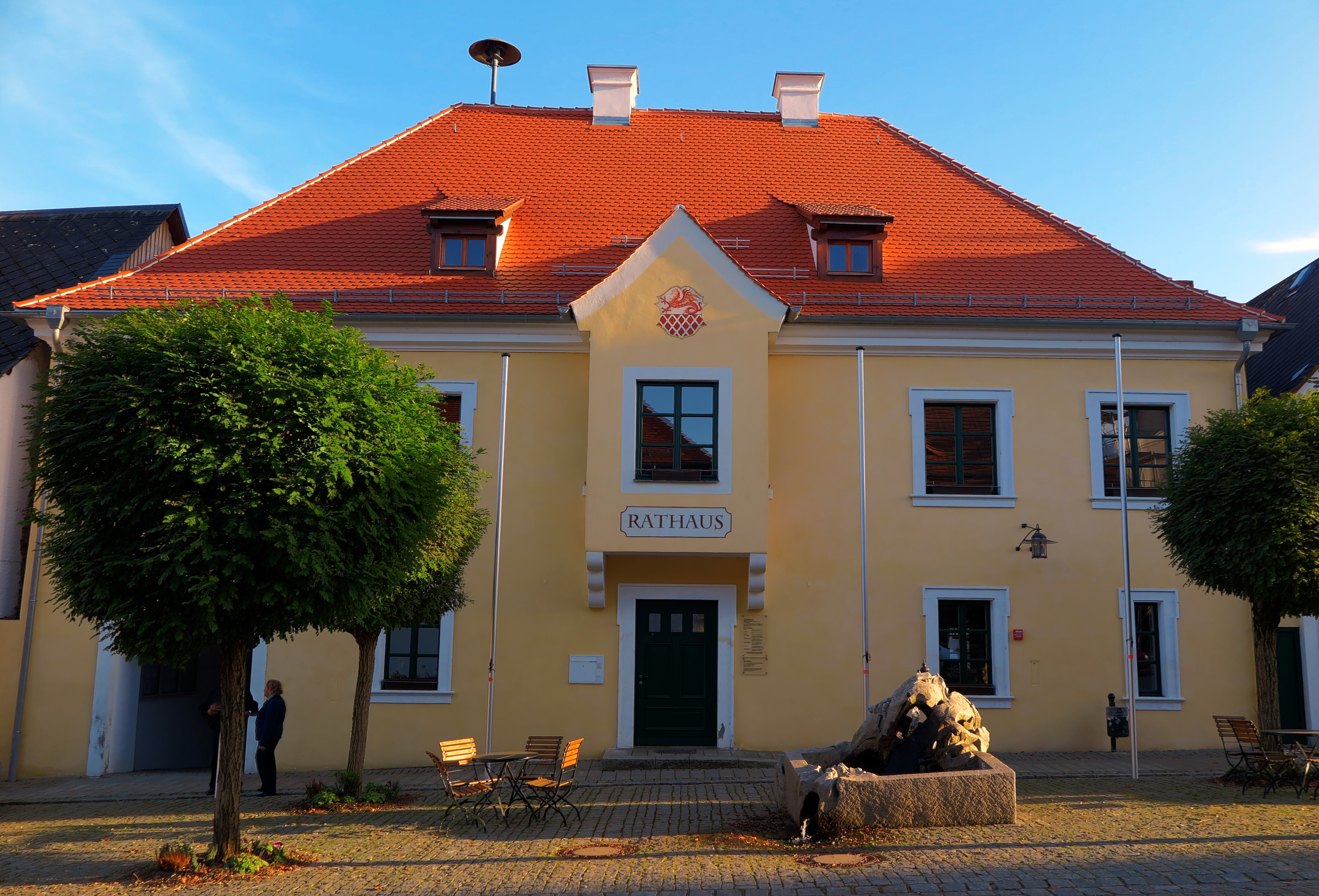 Deutschland, Bayern, Oberpfalz, Landkreis Tirschenreuth, Gemeinde Neualbenreuth, Rathaus